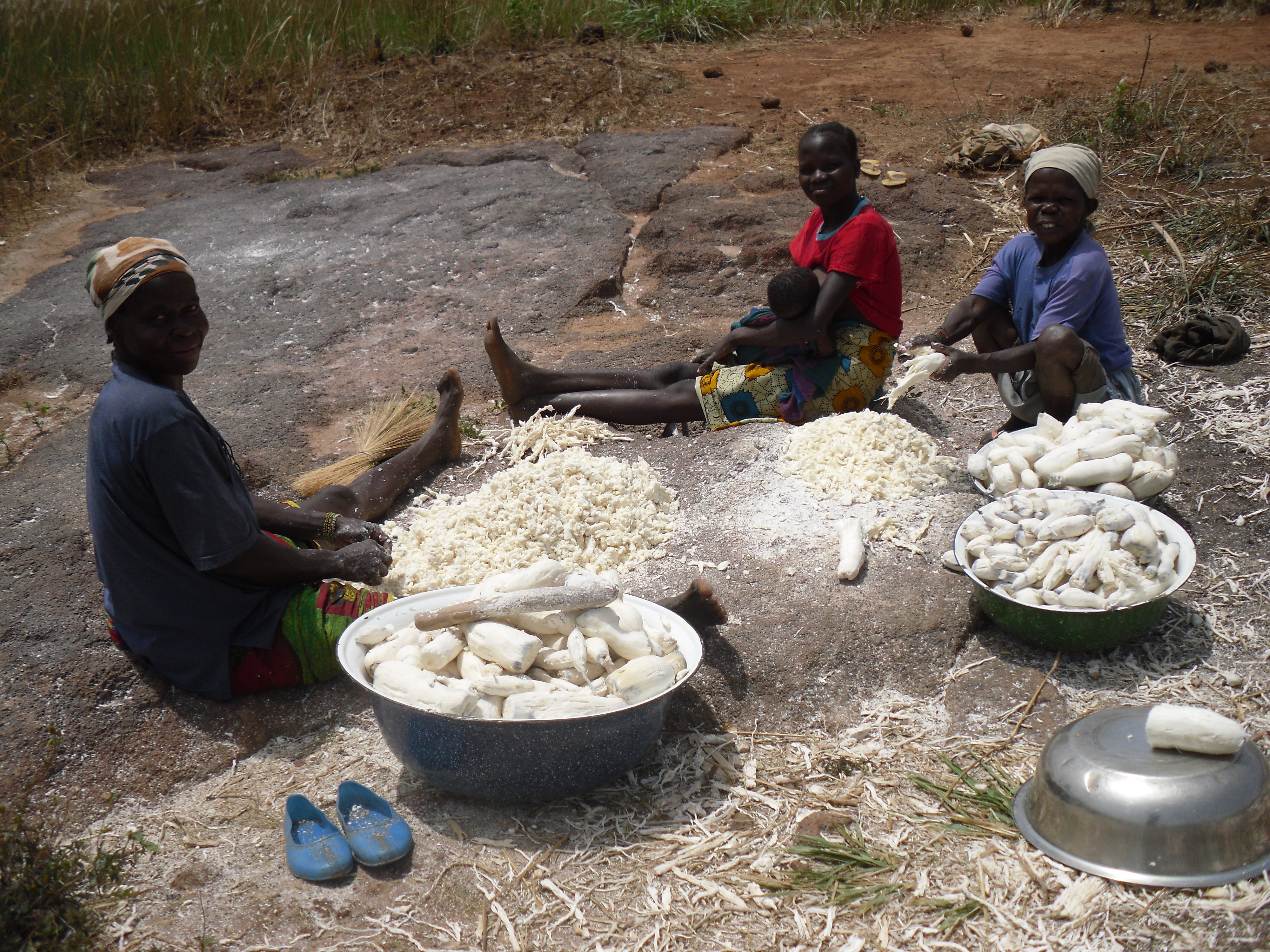 Transformation manioc This is an image of Cultural Fashion or Adornment from Central African Republic